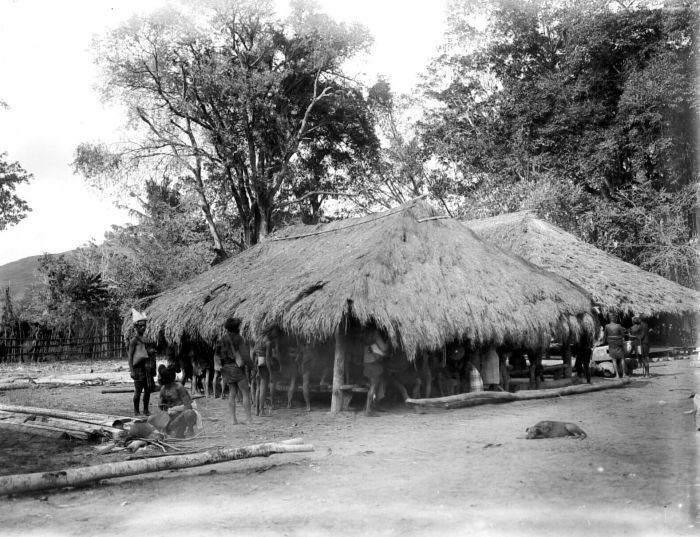 Negatief. Bij de grafsteenlegging van de vorst van Melolo, wordt gerouwd in het Kawaru huisje in kampong Tambaka bij Melolo, Sumba